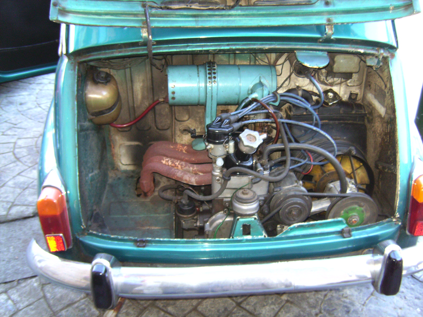 SEAT 600 engine